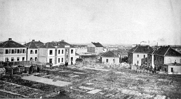 Diese Häuser ließ der Sozialreformer Georg von Schulpe (1867 - 1936) auf eigene Kosten auf der Schanzstrasse in Preßburg errichten.